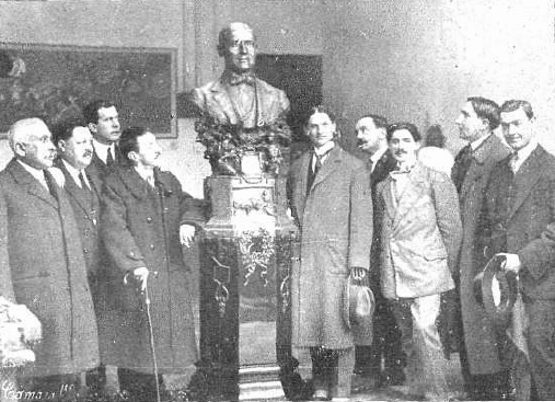 Fotografía del matador español retirado Ricardo Torres Reina, su hermano Manuel y otras personas junto a un busto del primero